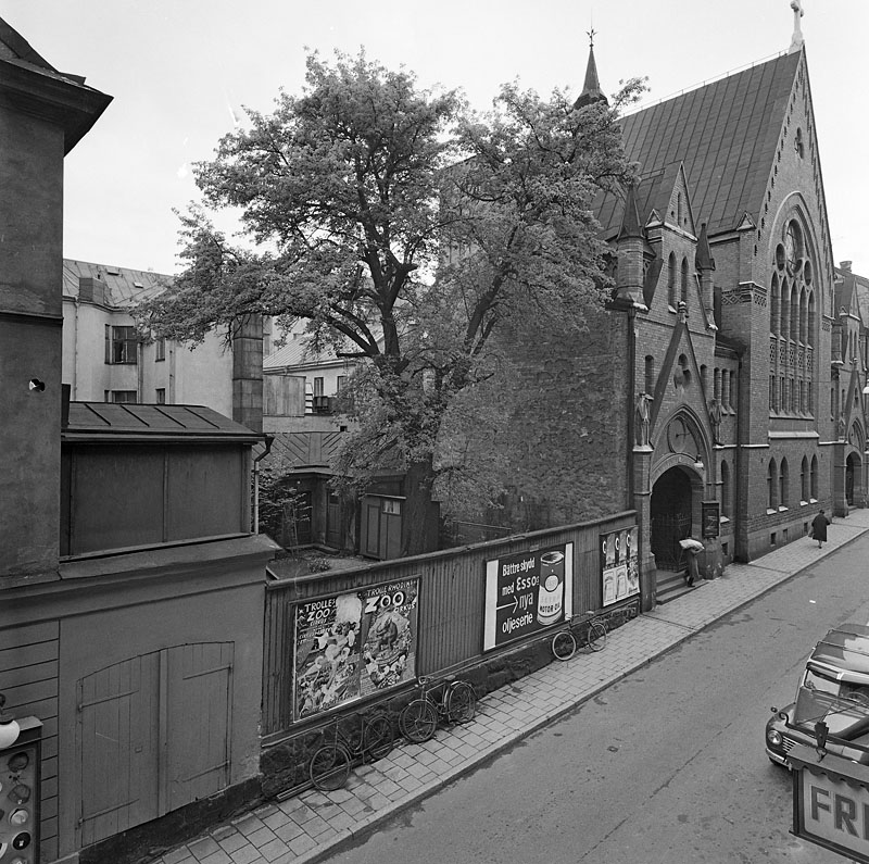 Majorsgatan med päronträdet och Trefaldighetskyrkan. Fotonummer Fa 35586